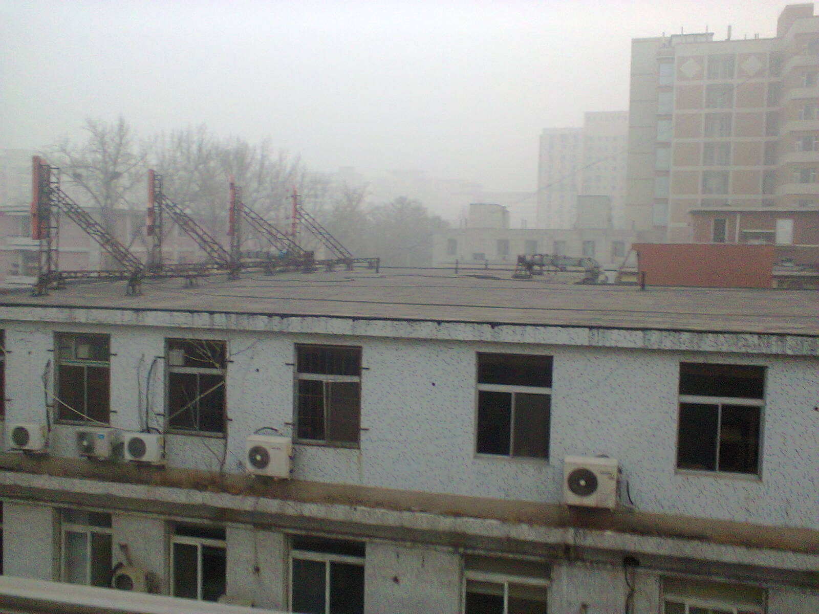 拍摄于北京复兴医院